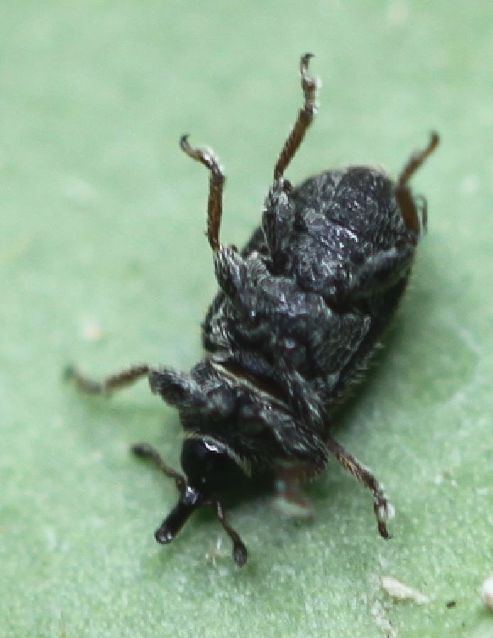 Schrägbinden-Gallenrüssler (Mecinus labilis) am 20. Januar 2020 an einem Platanenstamm in Walldorf/Baden